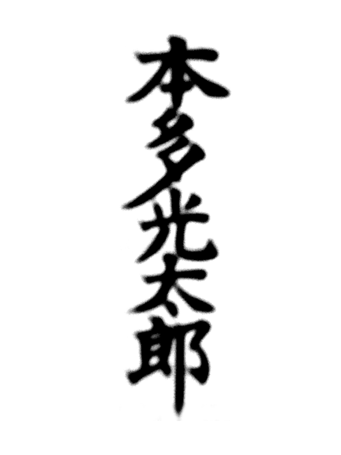 本多光太郎博士・東京理科大学学長のサイン